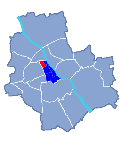 Muranów na mapie Śródmieścia w Warszawie (wg MSI)